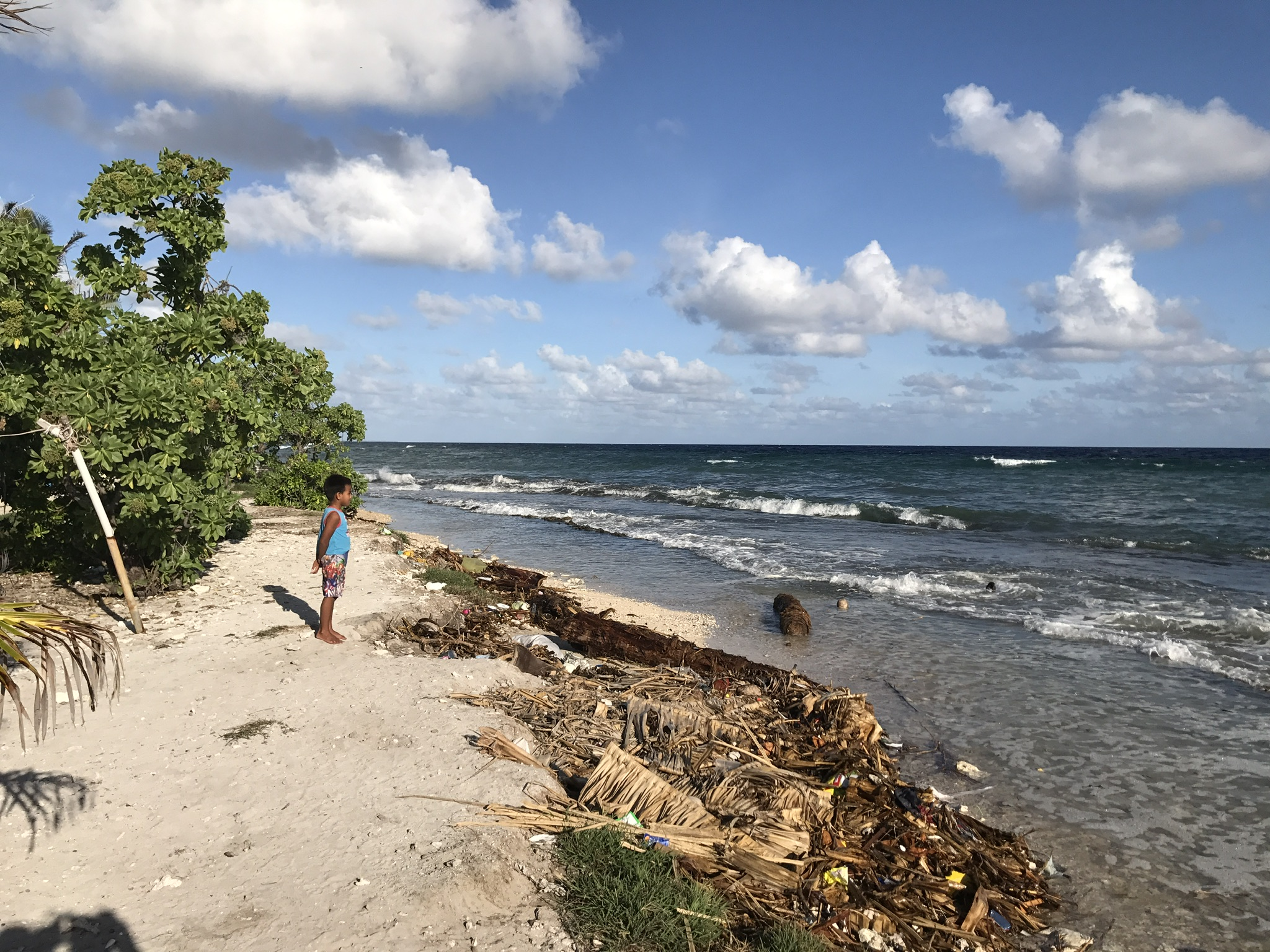 Bord de mer (Pacifique Nord) au sud du bourg de Teaoeaereke, Tarawa-Sud, Kiribati.